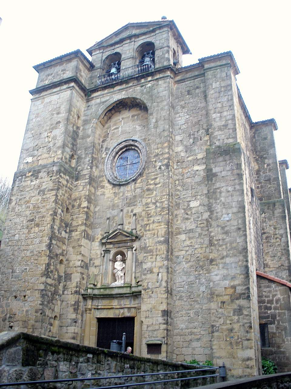 Iglesia de San Juan Bautista, en Pasajes de San Juan (Gipuzkoa)